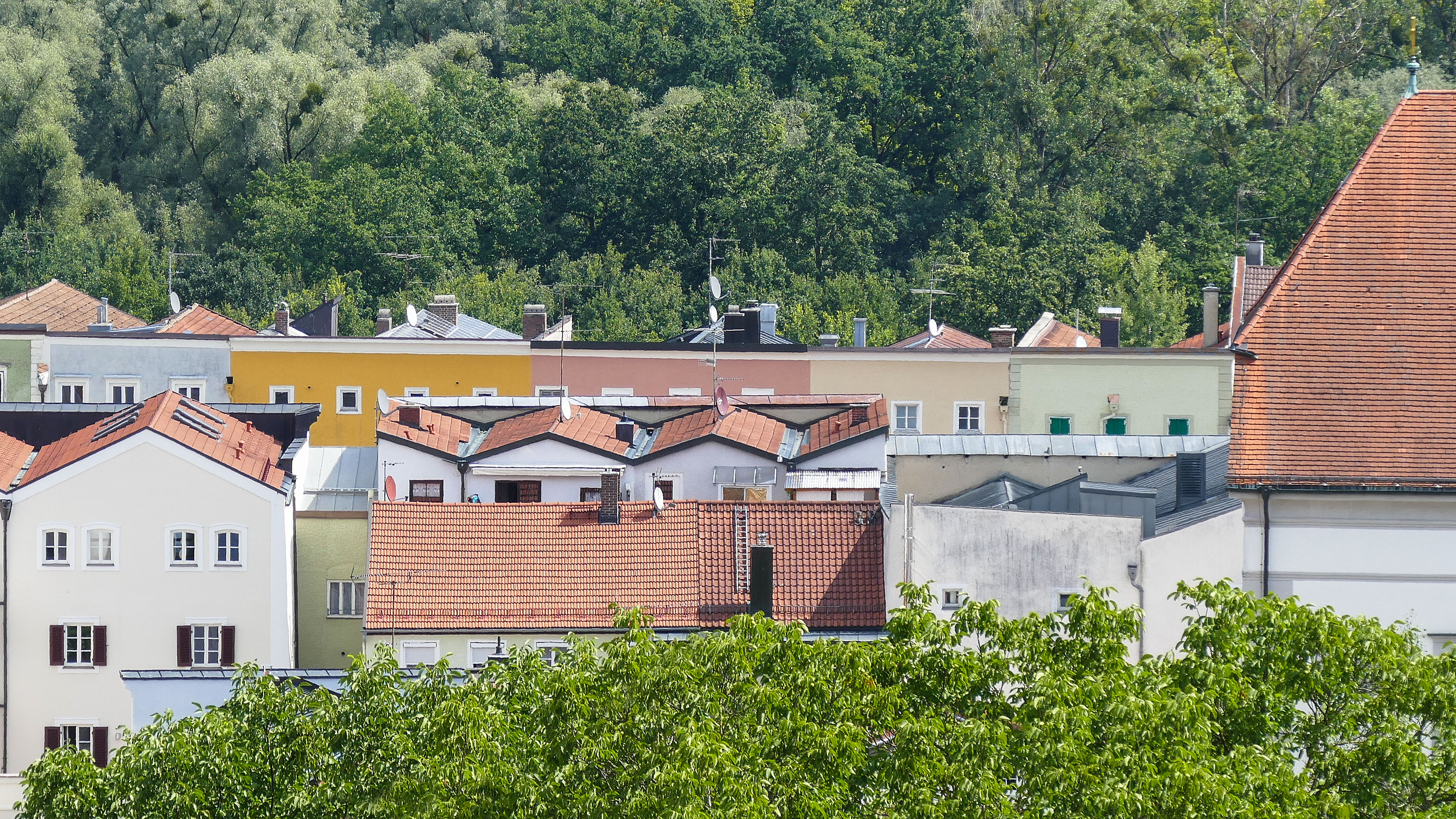 Blendfassaden am Stadtplatz von Tittmoning an der Salzach von der Straßen- und der Häuserseite